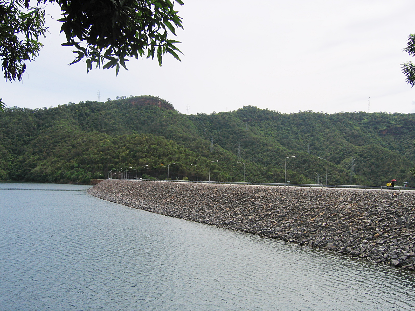 Srinagarindra Dam, Amphoe Si Sawat, Kanchanaburi Province, Thailand